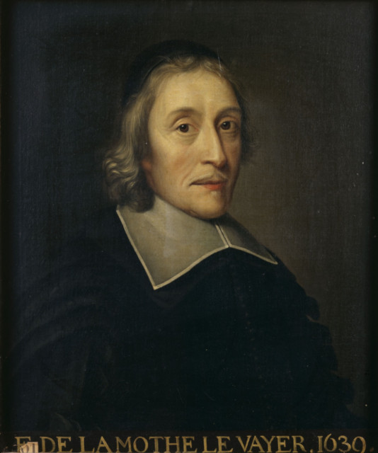 François de La Mothe Le Vayer (1588-1672), French author.